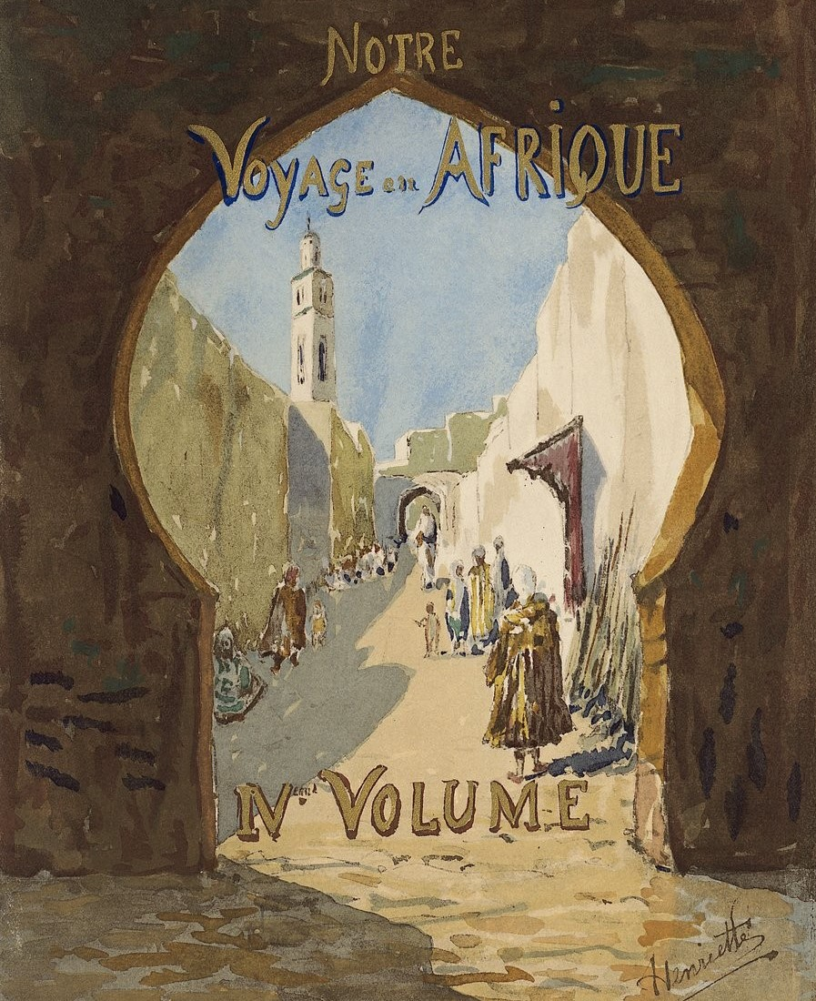 Voyage en Afrique du Nord de la duchesse de Vendôme (publiée en 1928)